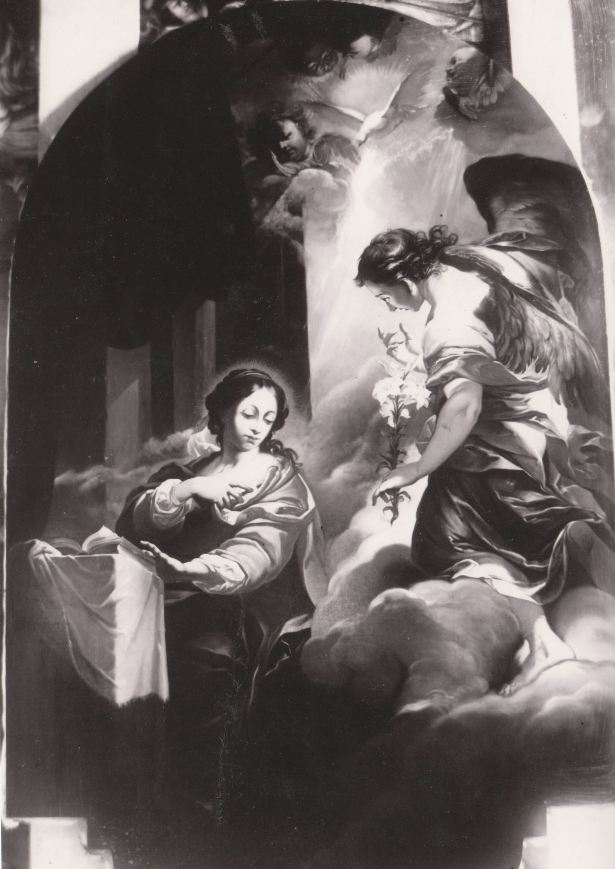 kopie Zvěstování Panny Marie (1929), originál od V.V.Reinera je umístěn v kostele Panny Marie Sněžné v Praze